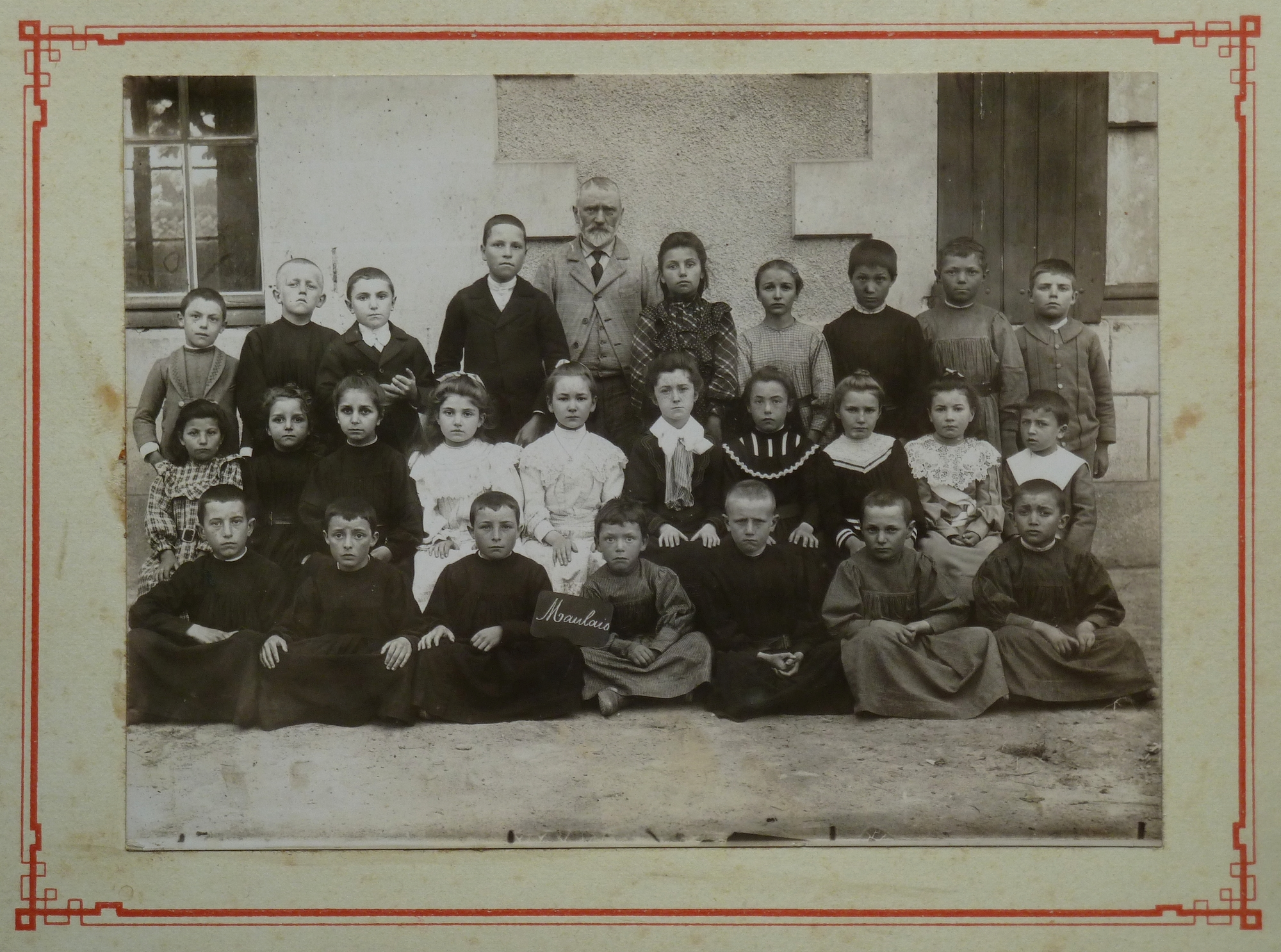 Photo de classe, école primaire de Maulais (Deux-Sèvres), vers 1890 (?). Photographe inconnu. Dimension cliché : 16 x 12 cm. Collection privée.